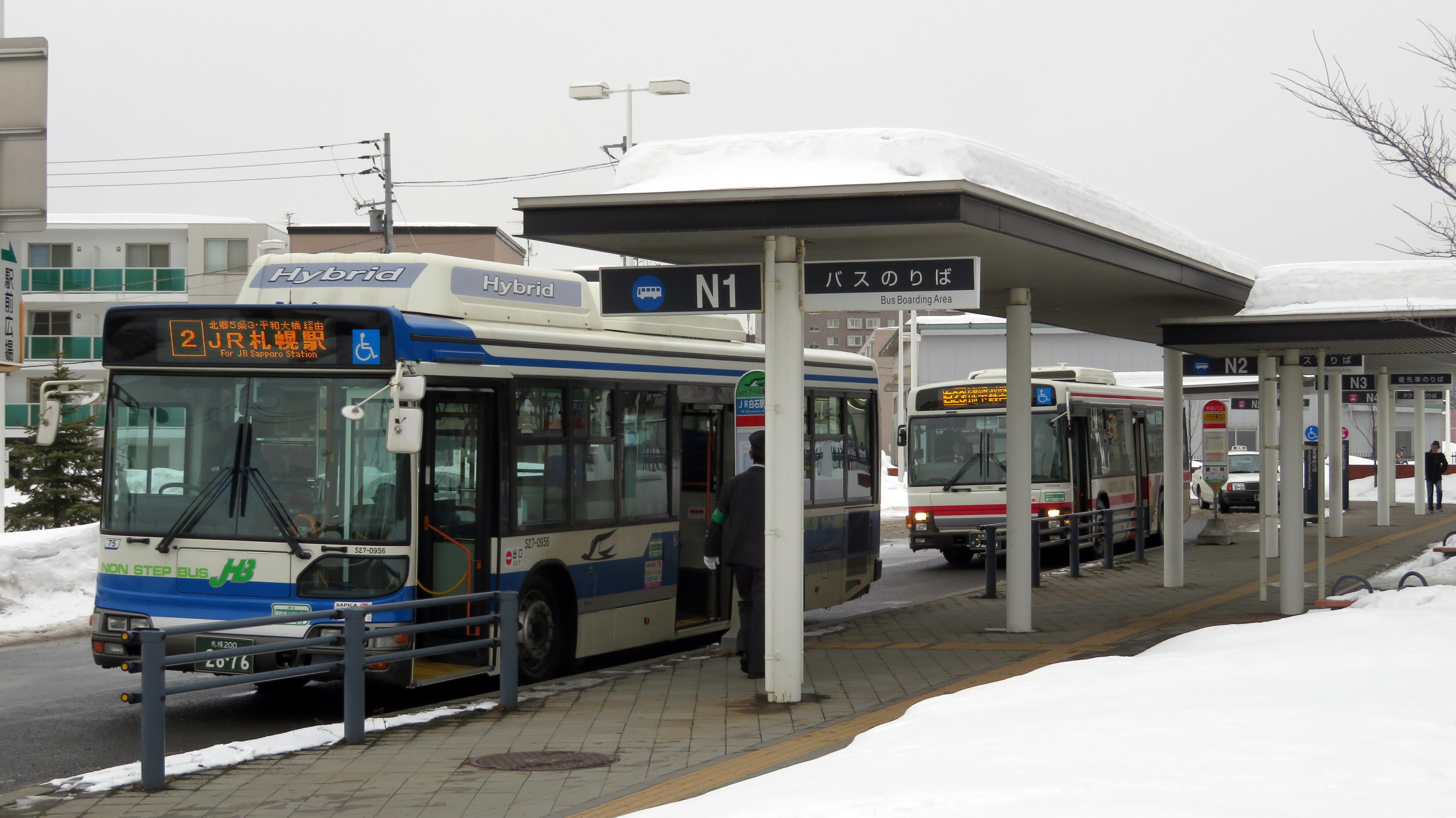 JR白石駅北口バスのりば Canon PowerShot SX720 HS